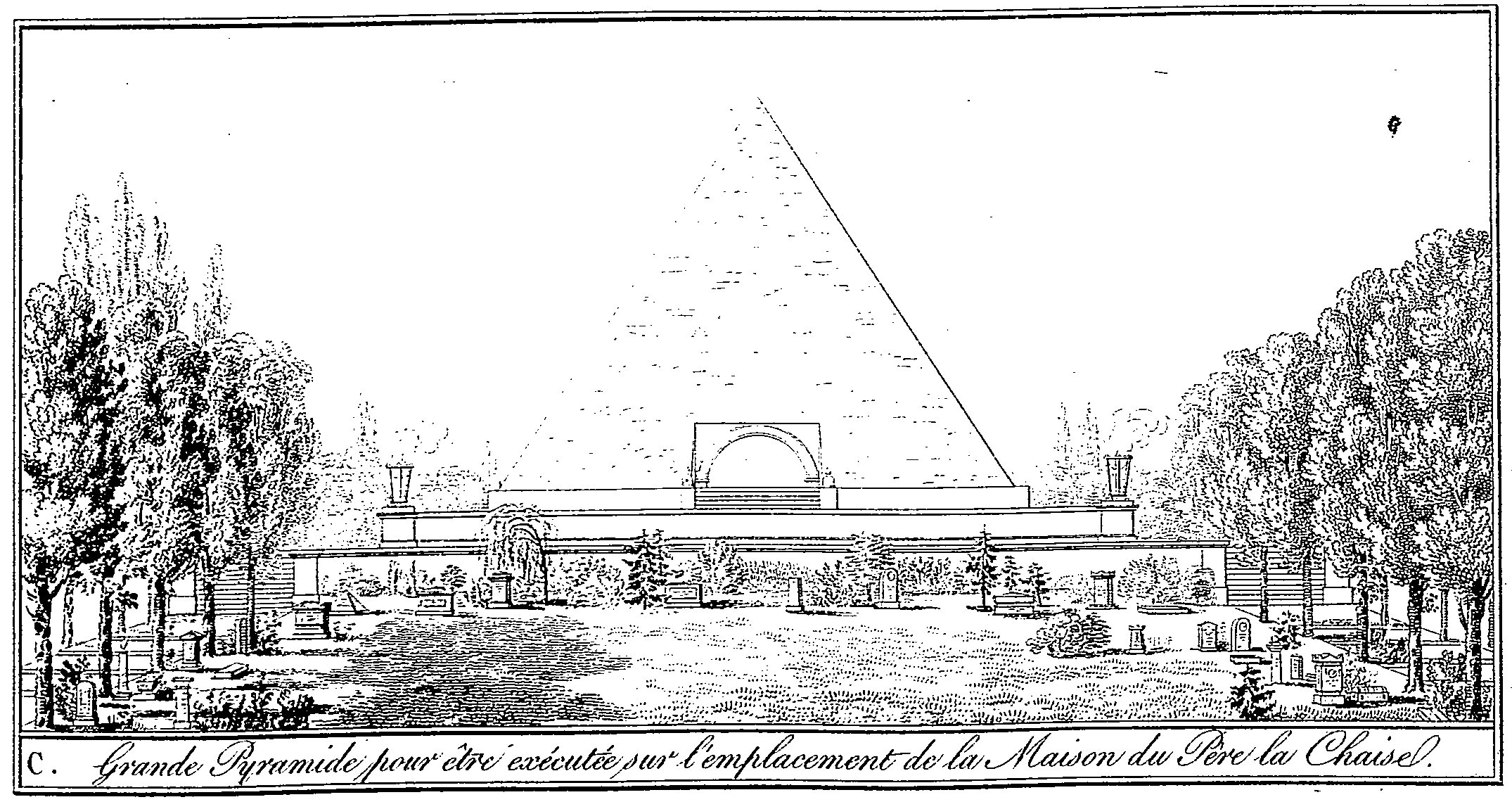 Monuments exécutés ou projettés pour le cimetière Mont-Louis du Père La Chaise par A. T. Brongniart. Grande pyramide pour être exécutée sur l'emplacement de la maison du Père la Chaise